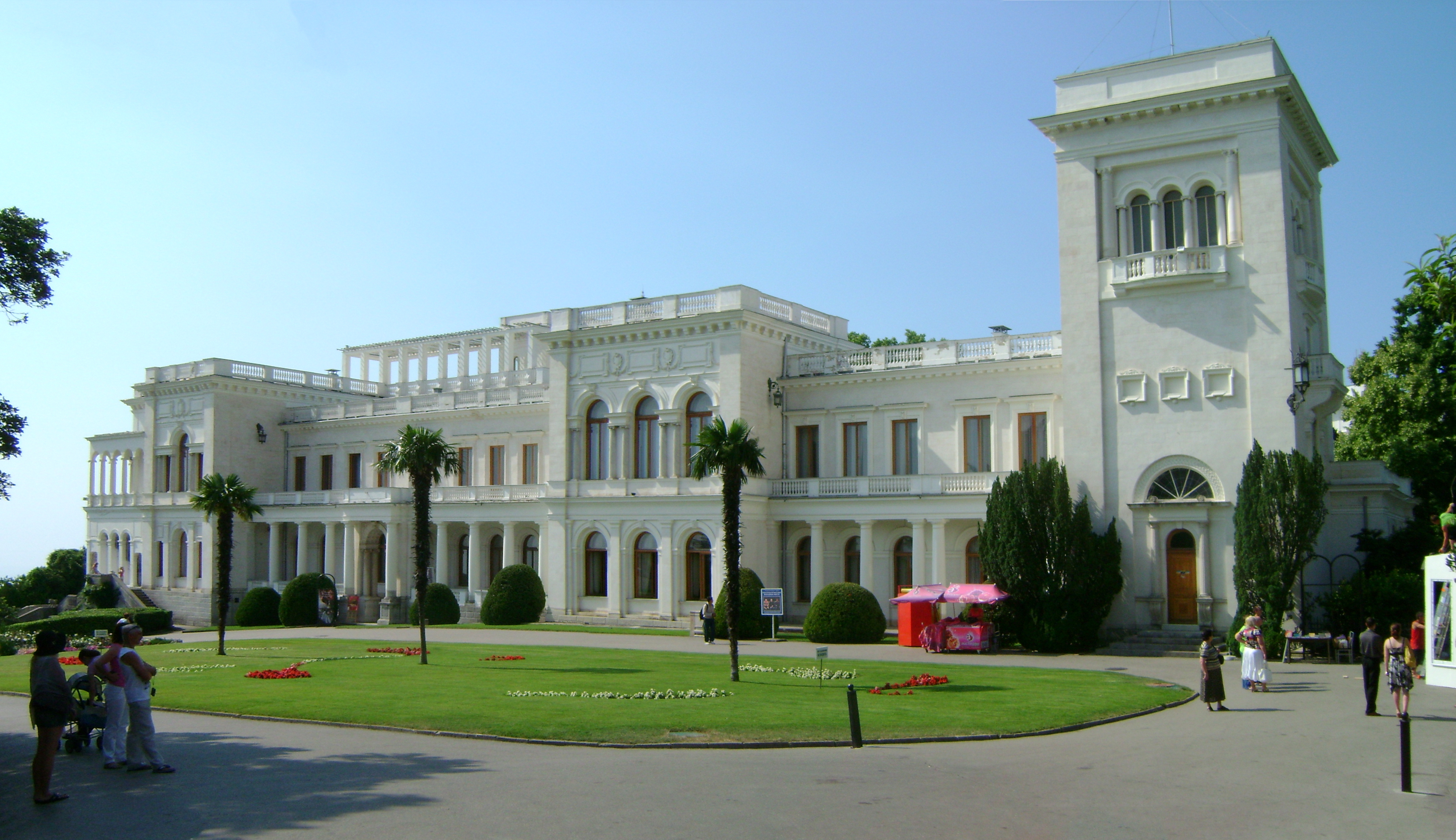 Лівадійський палацовий комплекс, Лівадія, вул. Батурина, 44